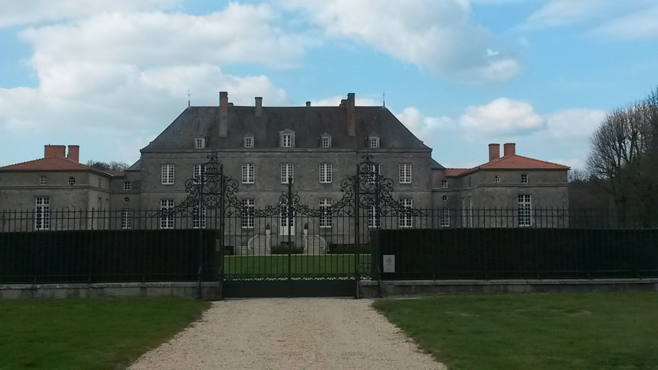 Façade sud du château d'Asson, la Boissière de Montaigu, Vendée